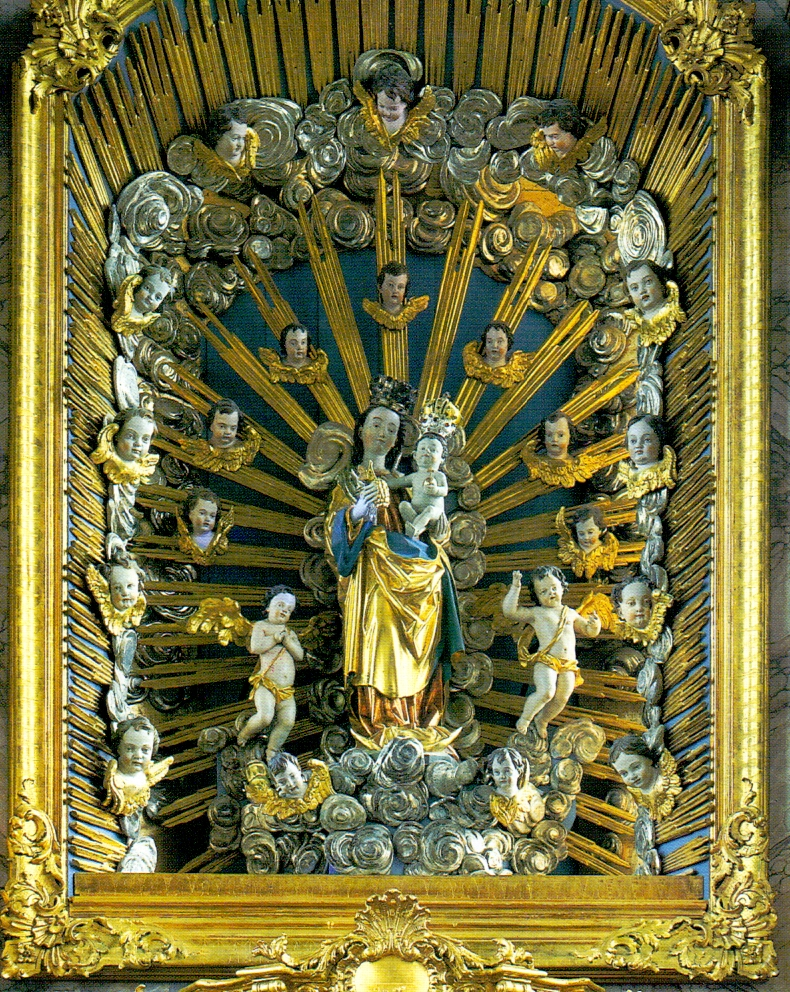 Gotische Madonna im Hochaltar der Pfarrkirche Mariä Himmelfahrt (Kirchdorf bei Haag i. OB), Mitte 15. Jahrhundert.